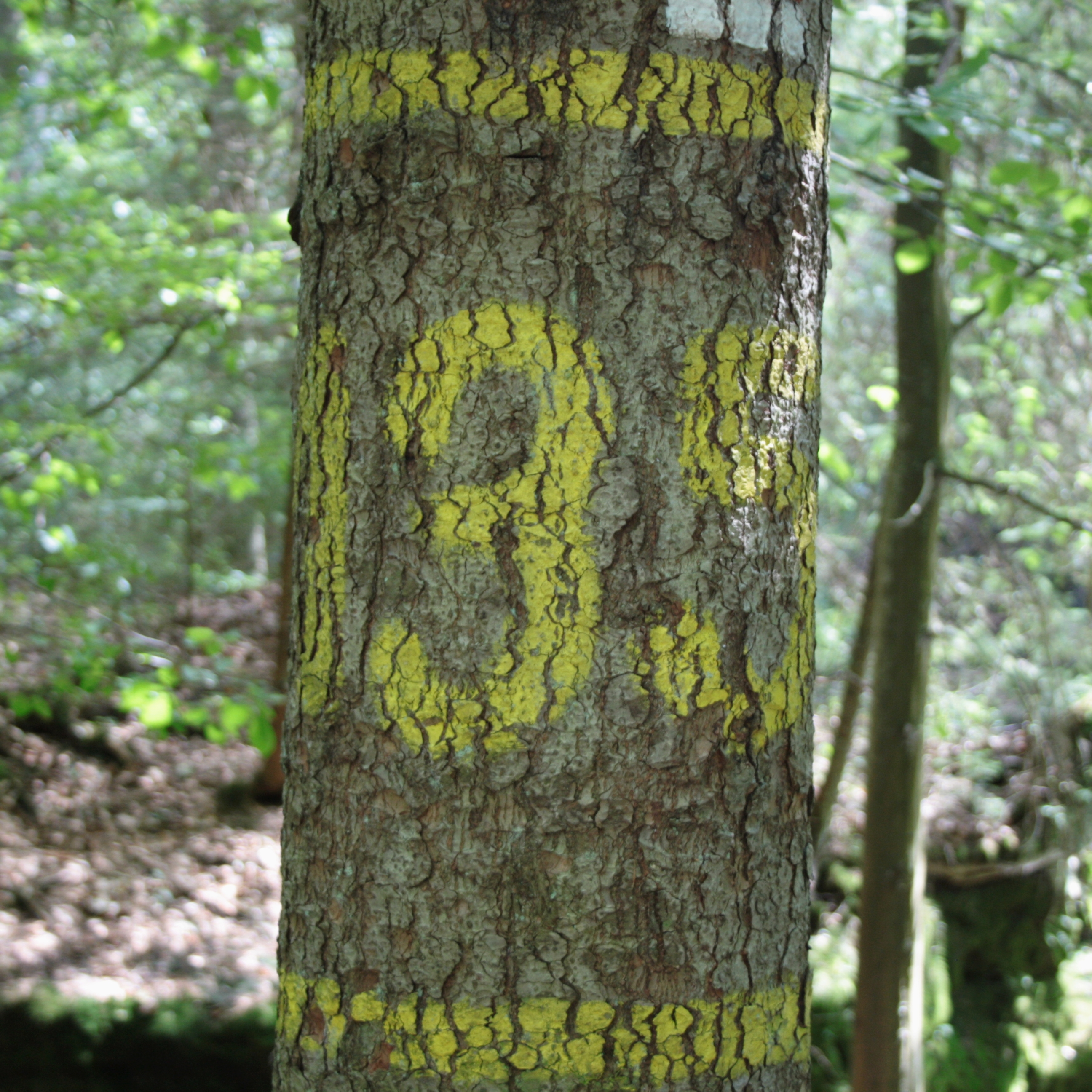 Pavlino údolí